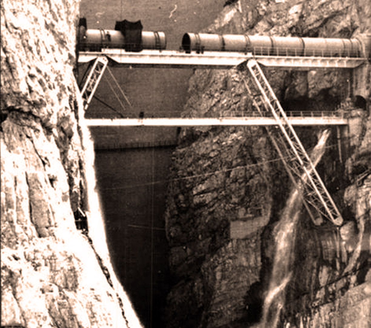 Il nuovo ponte canale in acciaio quasi ultimato, in sostituzione del precedente in cemento armato distrutto dall'onda del 9 ottobre 63